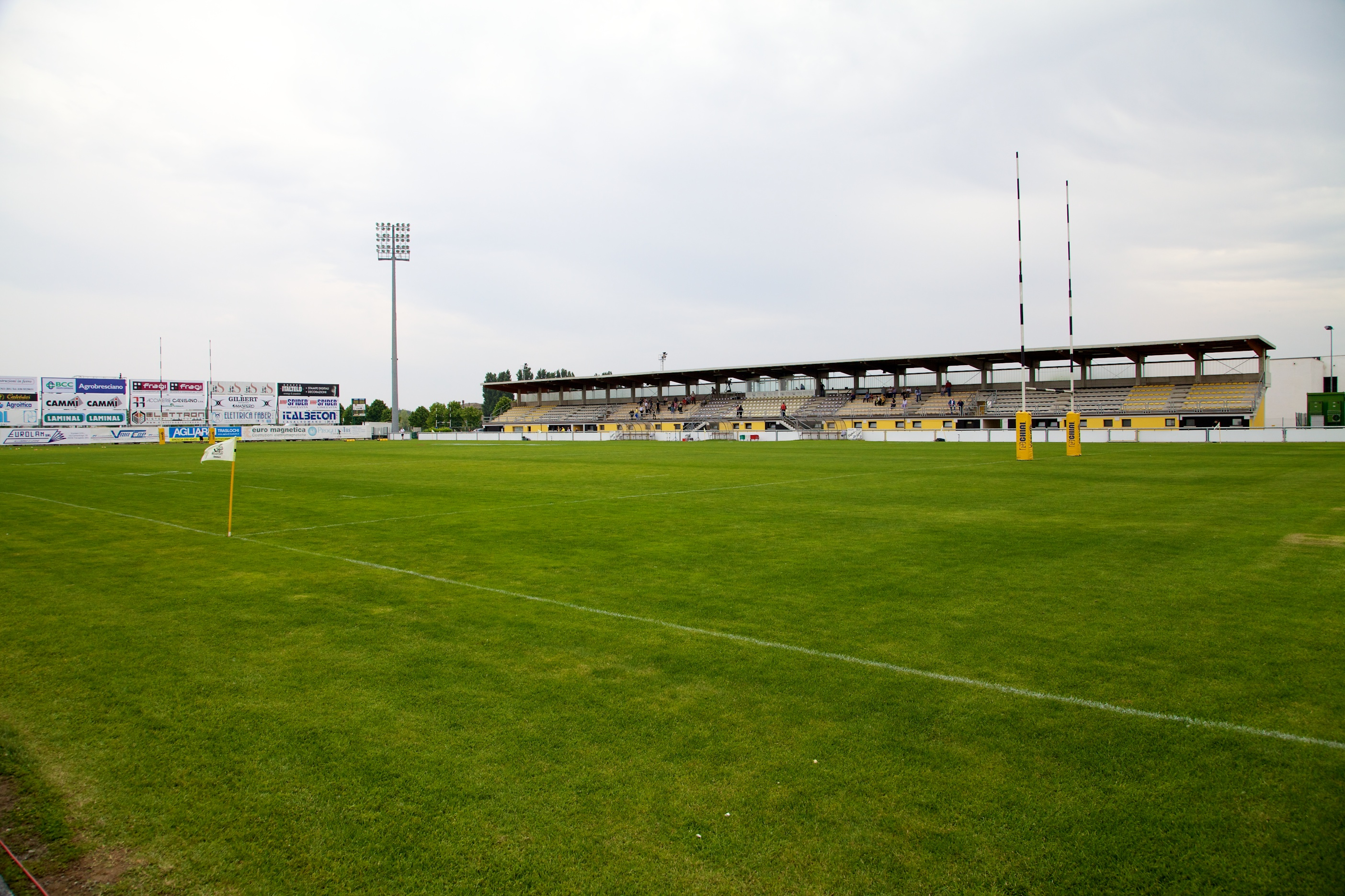 Vista del Peroni Stadium di Calvisano (Stadio San Michele)